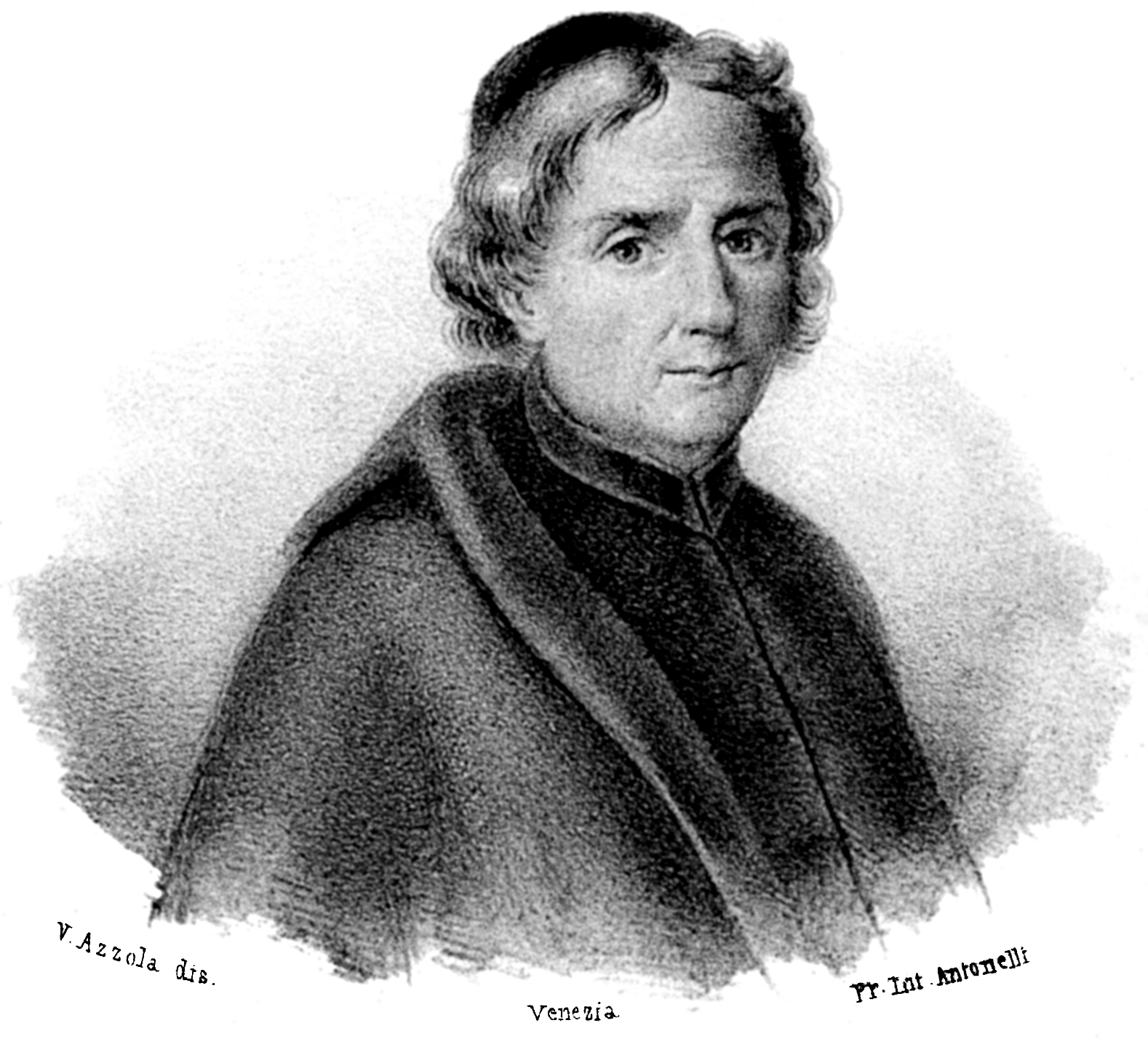 Immagine dal libro Annali d'Italia, Vol. 1 di Ludovico Antonio Muratori